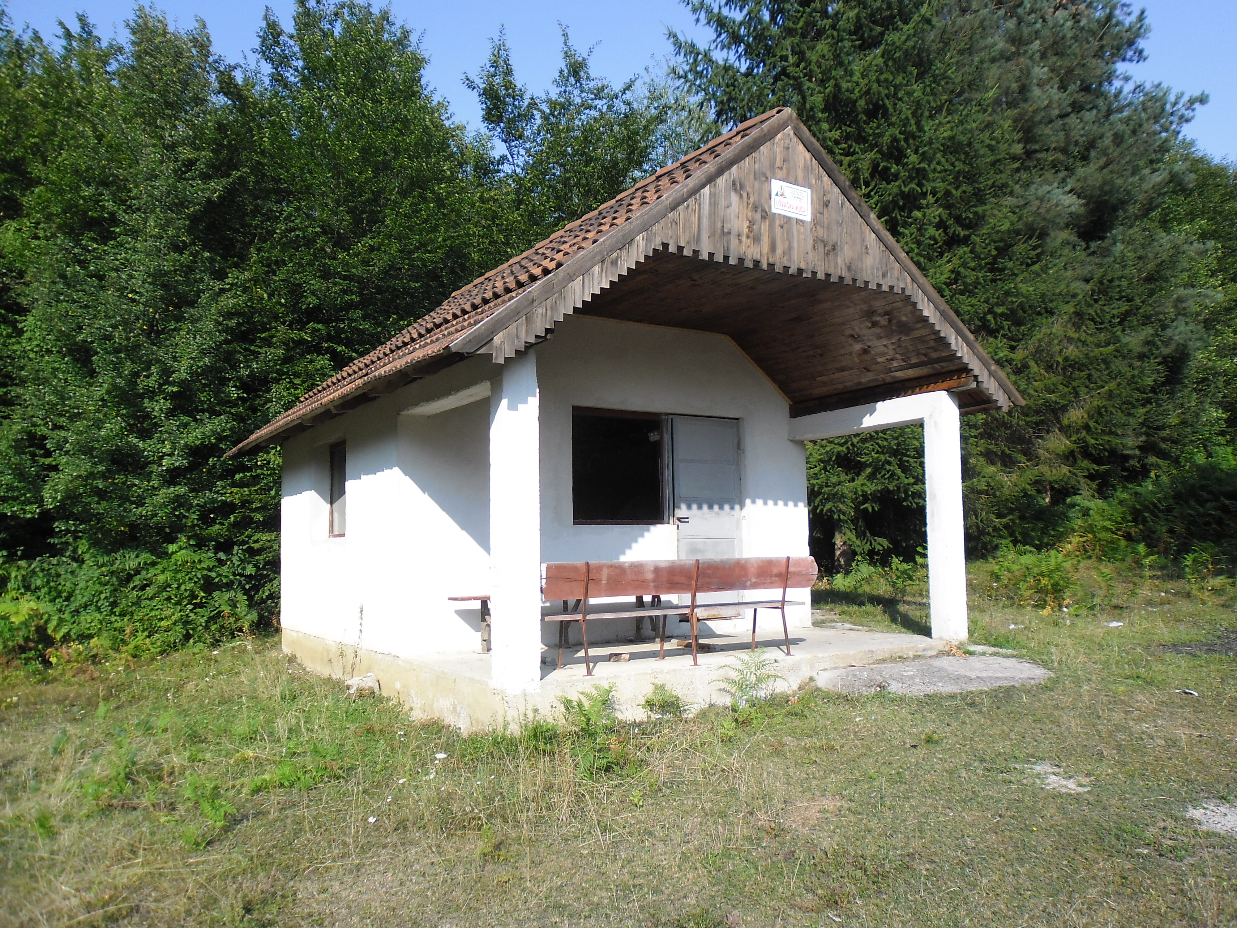 Lovačka kuća u Trnovi kod Sanskog Mosta.